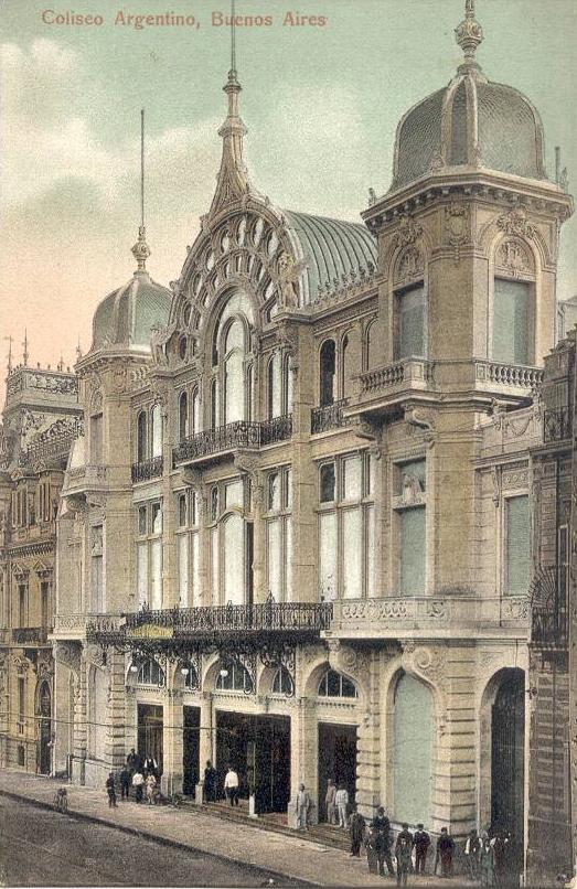 Antiguo edificio del Teatro Coliseo de Buenos Aires, obra realizada en hierro y vidrio por el arquitecto Carlos Nordmann, y demolida en 1938.